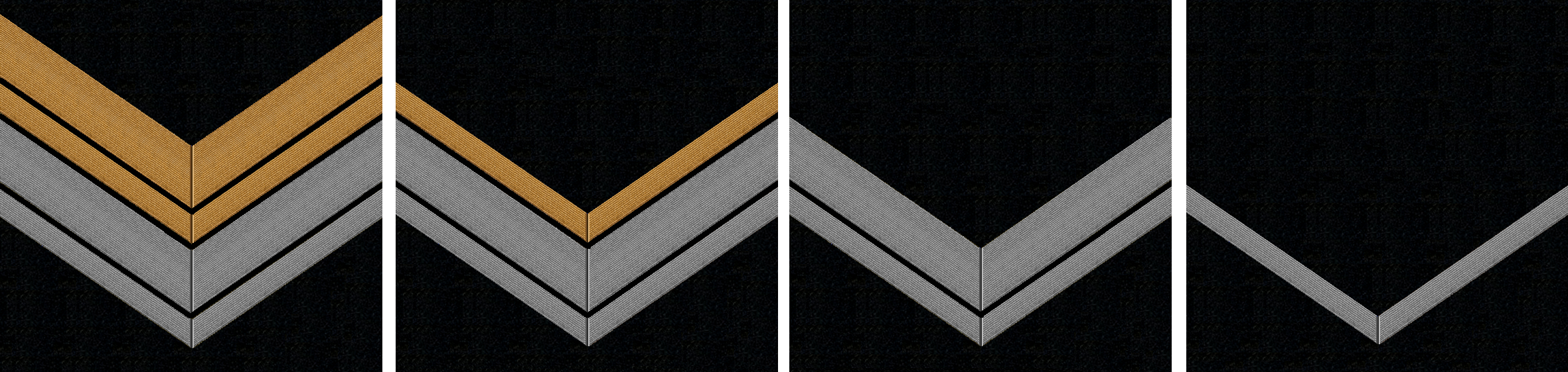 Шевроны сверхсрочн